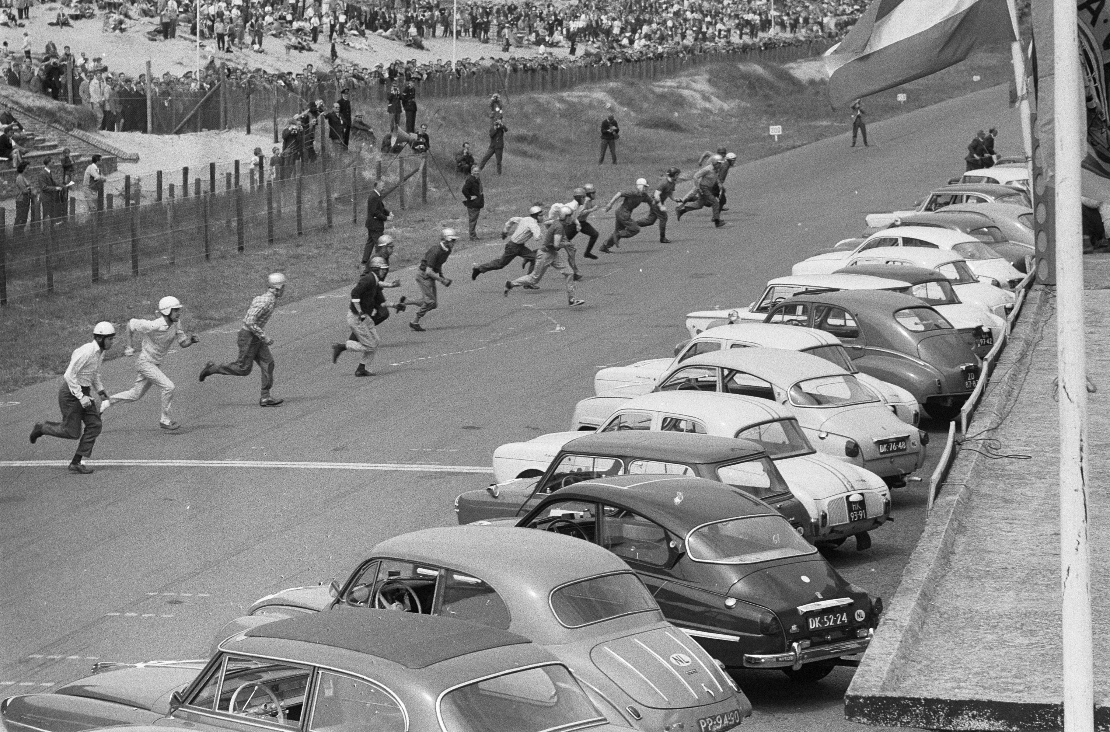 Collectie / Archief : Fotocollectie Anefo Reportage / Serie : [ onbekend ] Beschrijving : Nationale sportwagenraces circuit Zandvoort M. Bijlsma Den Ouden , J. van Hemert en G. in t Hout Datum : 11 juni 1962 Trefwoorden : sportwagenraces Persoonsnaam : Circuit Zandvoort, Den Ouden, G. in t Hout M. Bijlsma Fotograaf : Bilsen, Joop van / Anefo Auteursrechthebbende : Nationaal Archief Materiaalsoort : Negatief (zwart/wit) Nummer archiefinventaris : bekijk toegang 2.24.01.05 Bestanddeelnummer : 914-0136